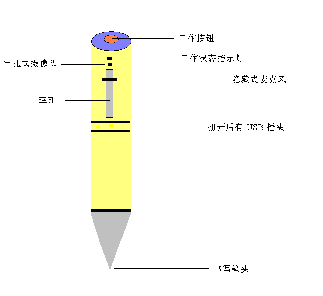 录像笔构造图